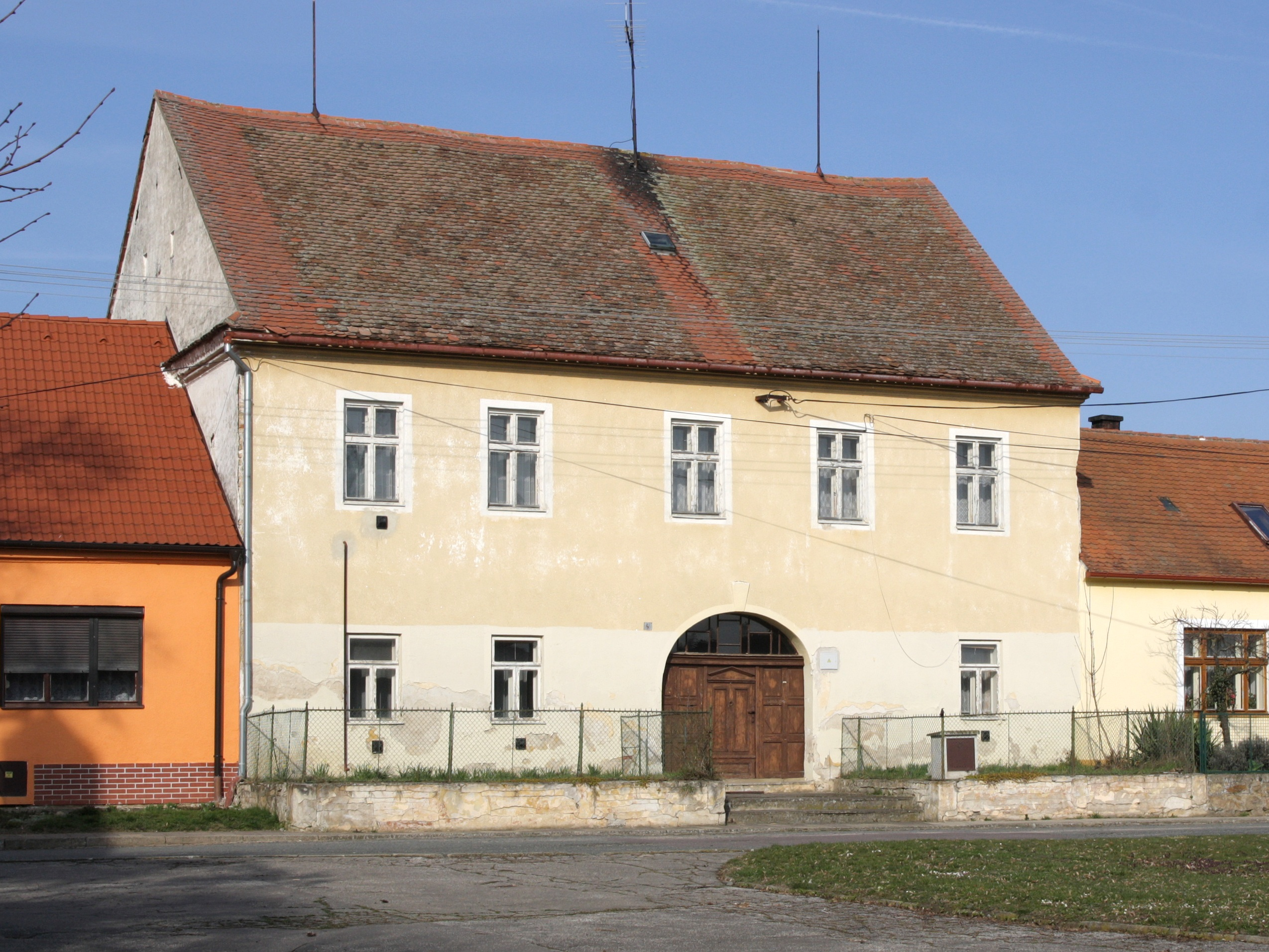 Horní Kounice - fara čp. 4 na návsi.